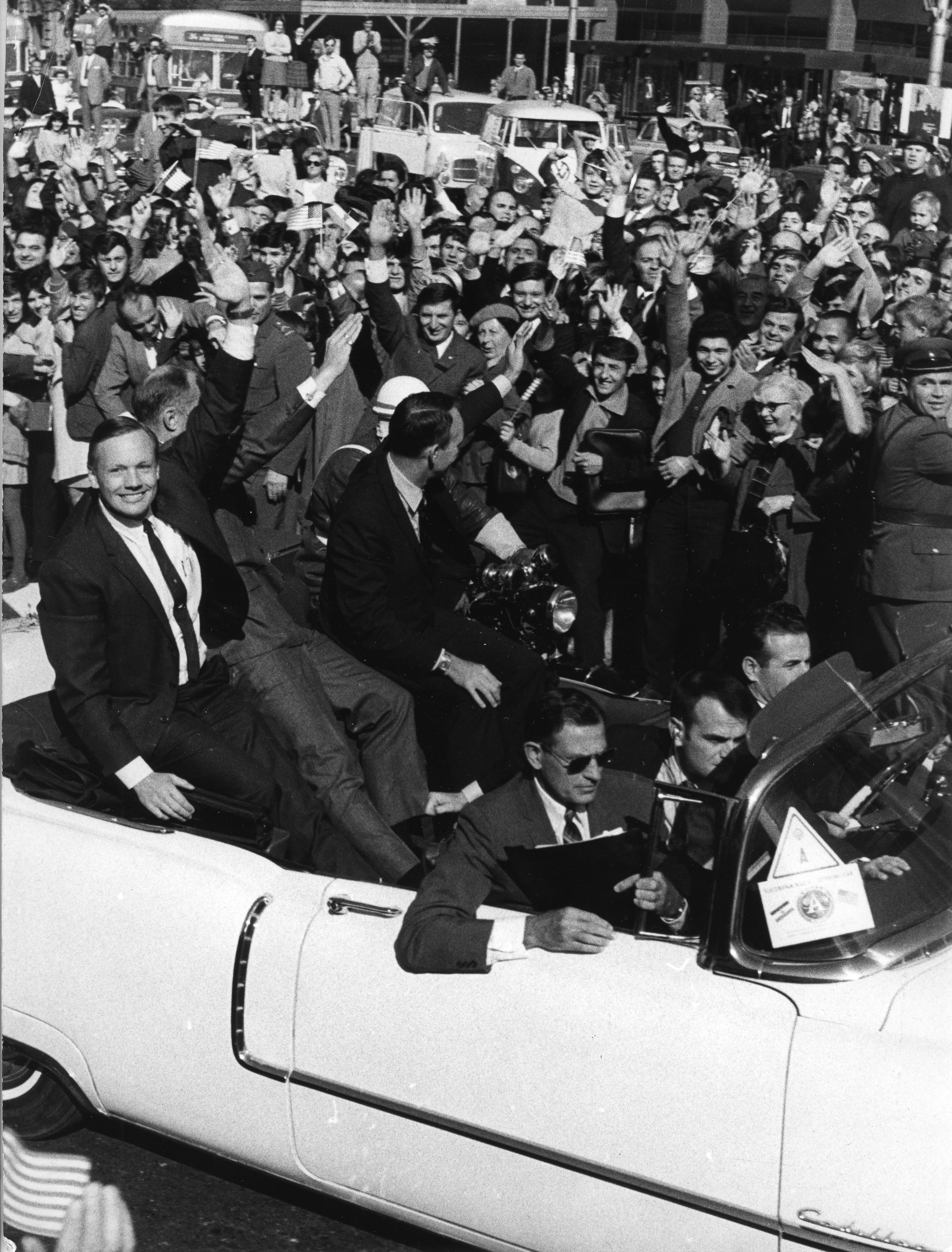 Astronaut Nil Amstrong u Beogradu, 1969. foto: Stevan Kragujević (po odobrenju kćerke Tanje Kragujević)